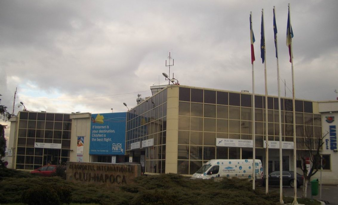 Cluj-Napoca International Airport (CLJ), Romania